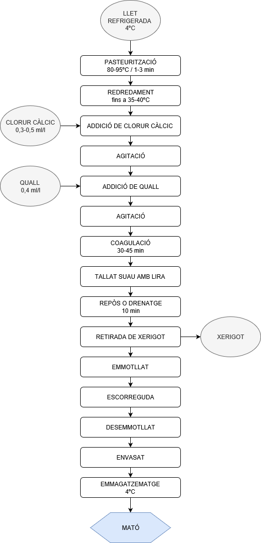 Diagrama de flux de mató de coagulació enzimàtica amb quall vegetal